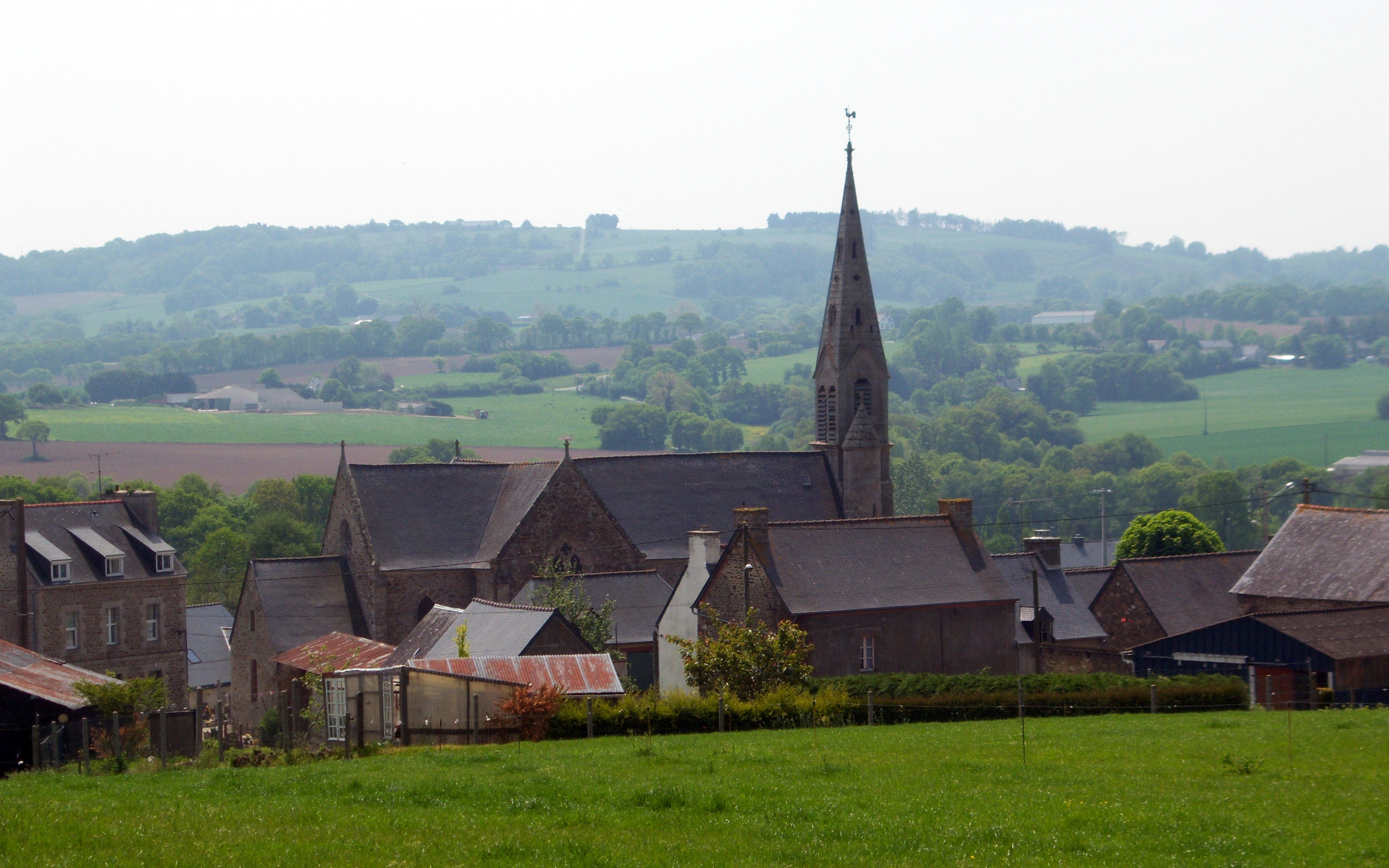 bourg de Saint-Péver